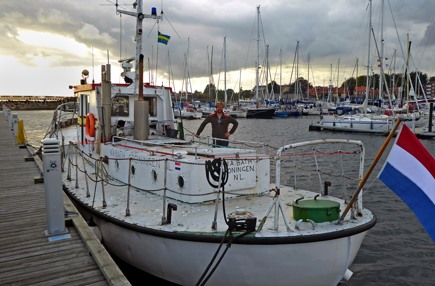 N. A. Båth fick i sep 2019 en ny ägare/kapten som ska ta den till Holland och bygga om den till husbåt. På bilden ligger den i Ystads småbåtshamn klar för avfärd till Groningen i Holland.